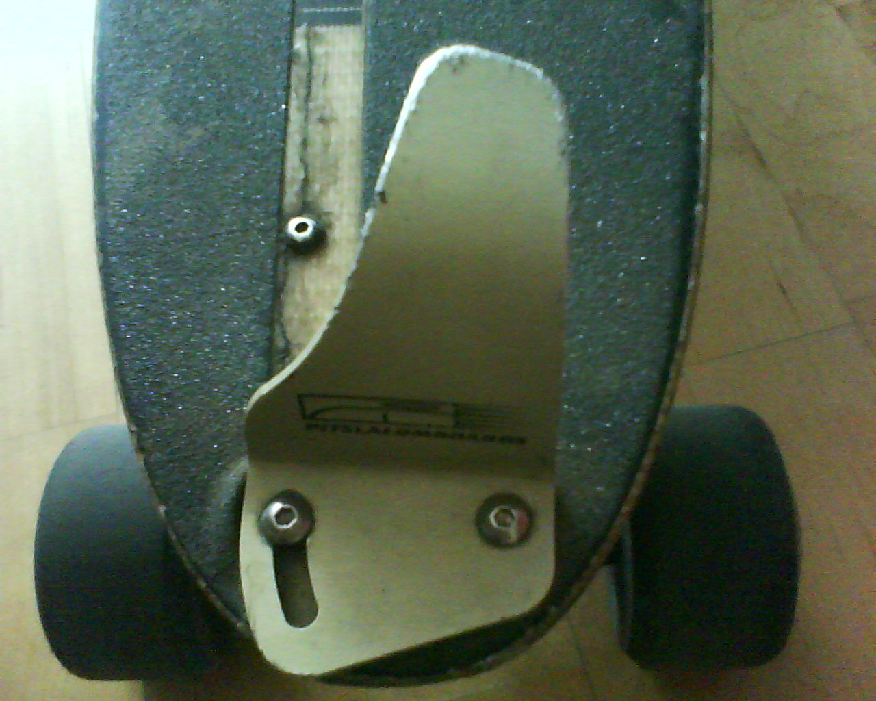 Skyhooks eines Slalomboard.